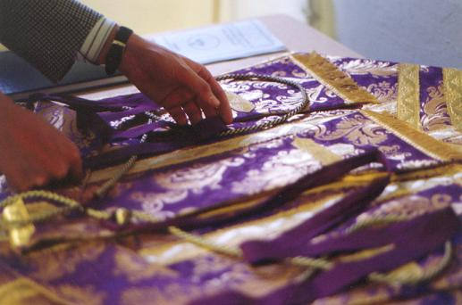 Opname uit de sacristie. Eigen Camera.